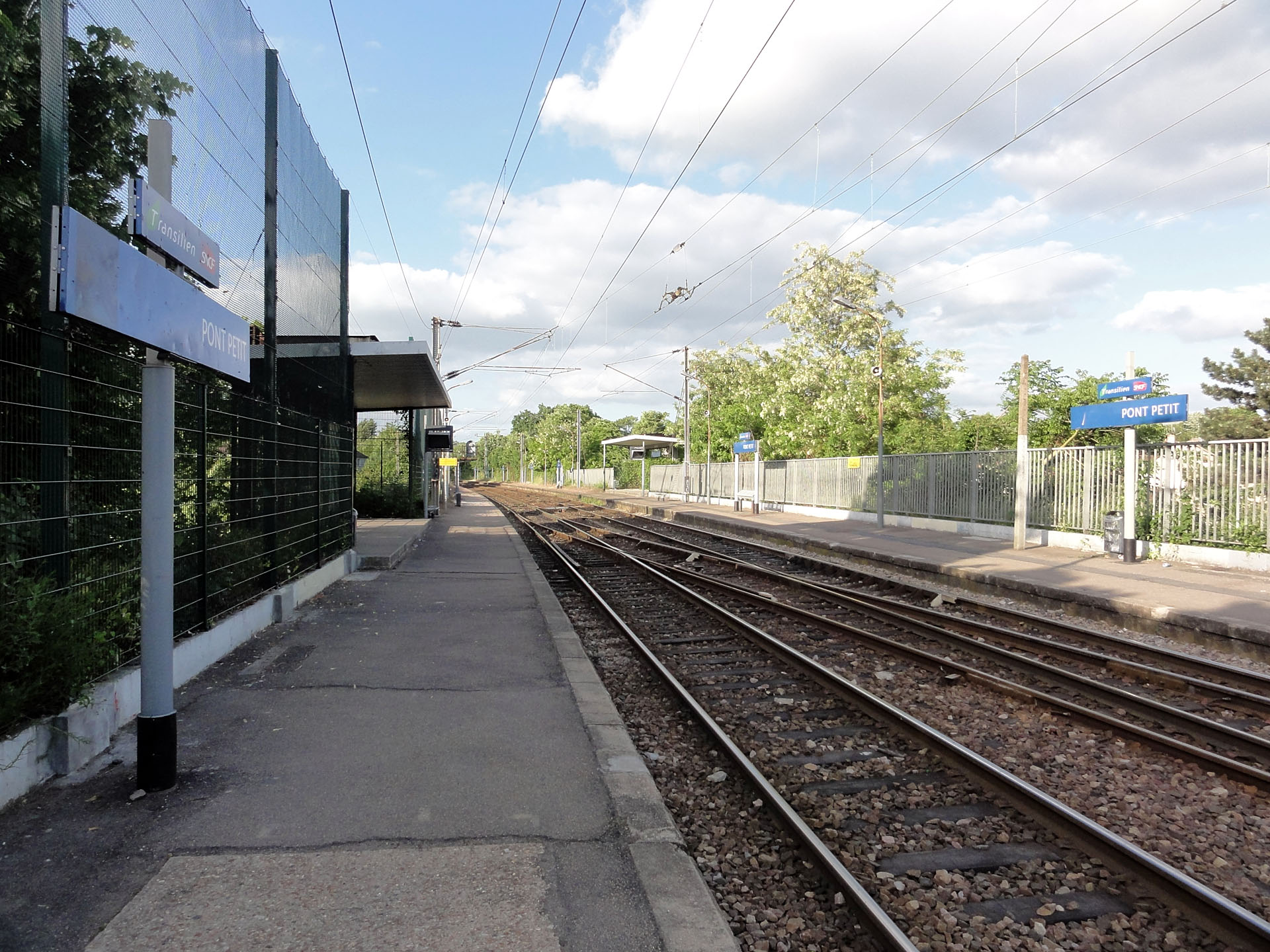 La gare de Pont-Petit à Saint-Ouen-l'Aumône, Val-d'Oise, France.